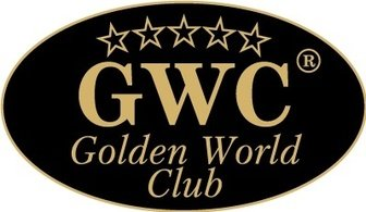 Golden World Club